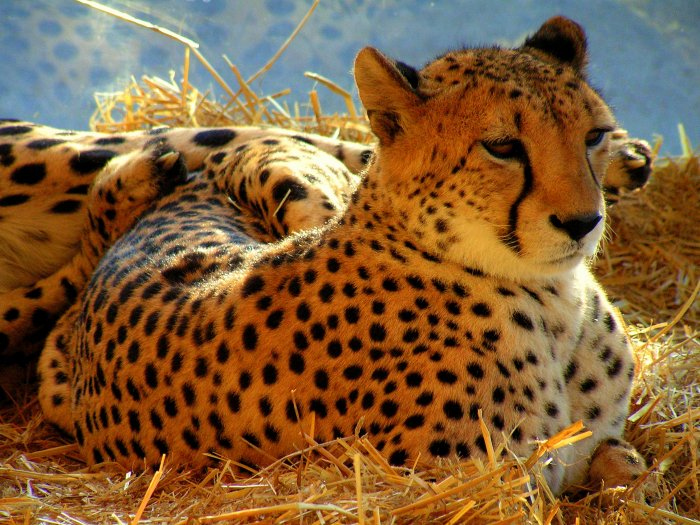 Gepard (Cheetah) in zoo - vienna